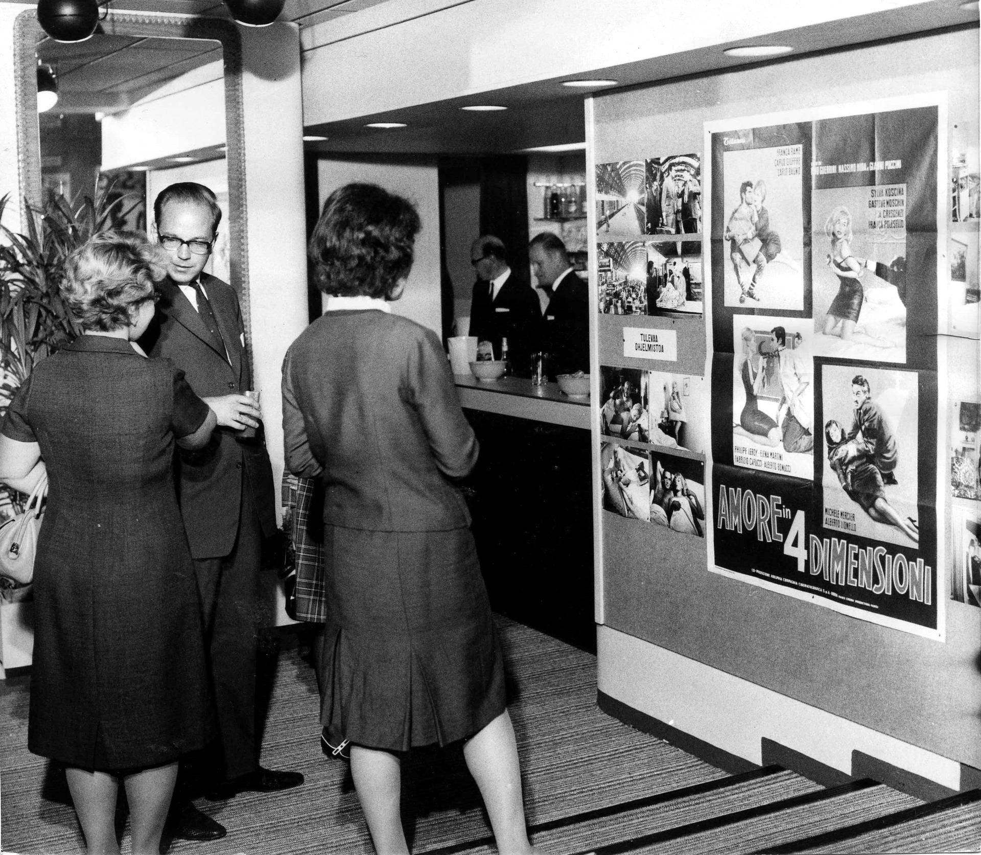 Elokuvateatteri Kruunun aula Helsingissä. Mainosjuliste Eevan temput – eli miten mies vietellään (Amore in 4 dimensioni). Kuvassa näkyvä mies on teatterin omistaja Pertti Himberg (1928–2010).